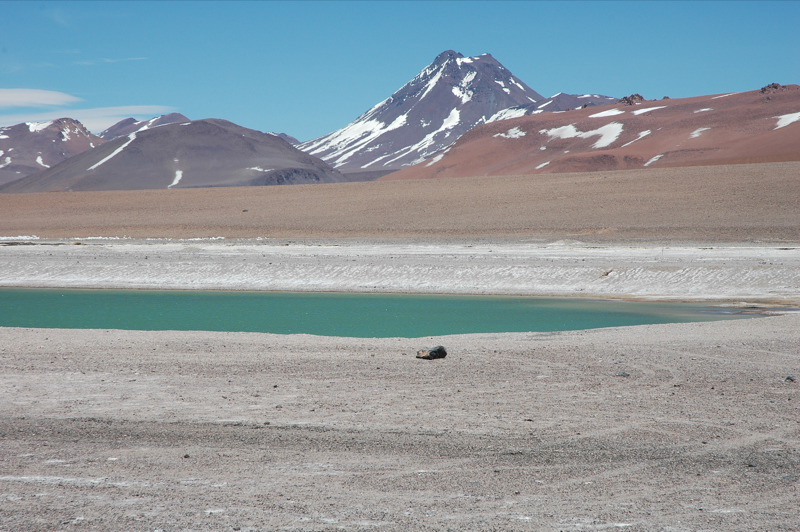 Acamarachi Volcano, Chile.Acamarachi volcano, Chile, 23º06'34" S, 67º32'52"W . 4568m altitude.